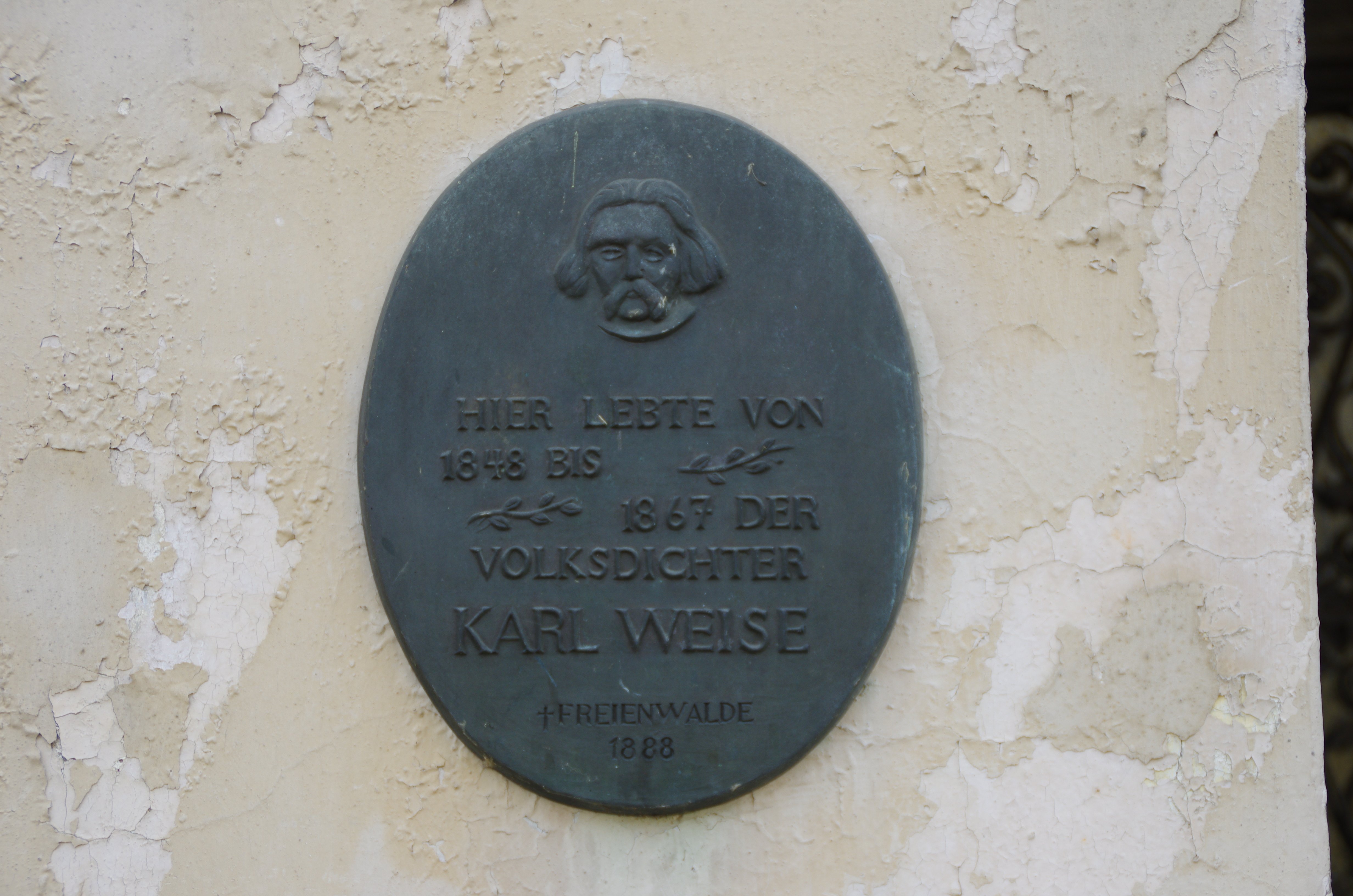 Bad Freienwalde in Brandenburg. Das Haus in der Königsstraße 36 steht unter Denkmalschutz. An dem Haus befindet sich die Denkmaltafel für Karl Weise.